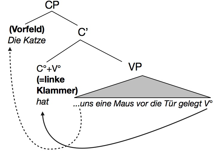 X-Bar-Struktur eines deutschen Verbzweit-Satzes